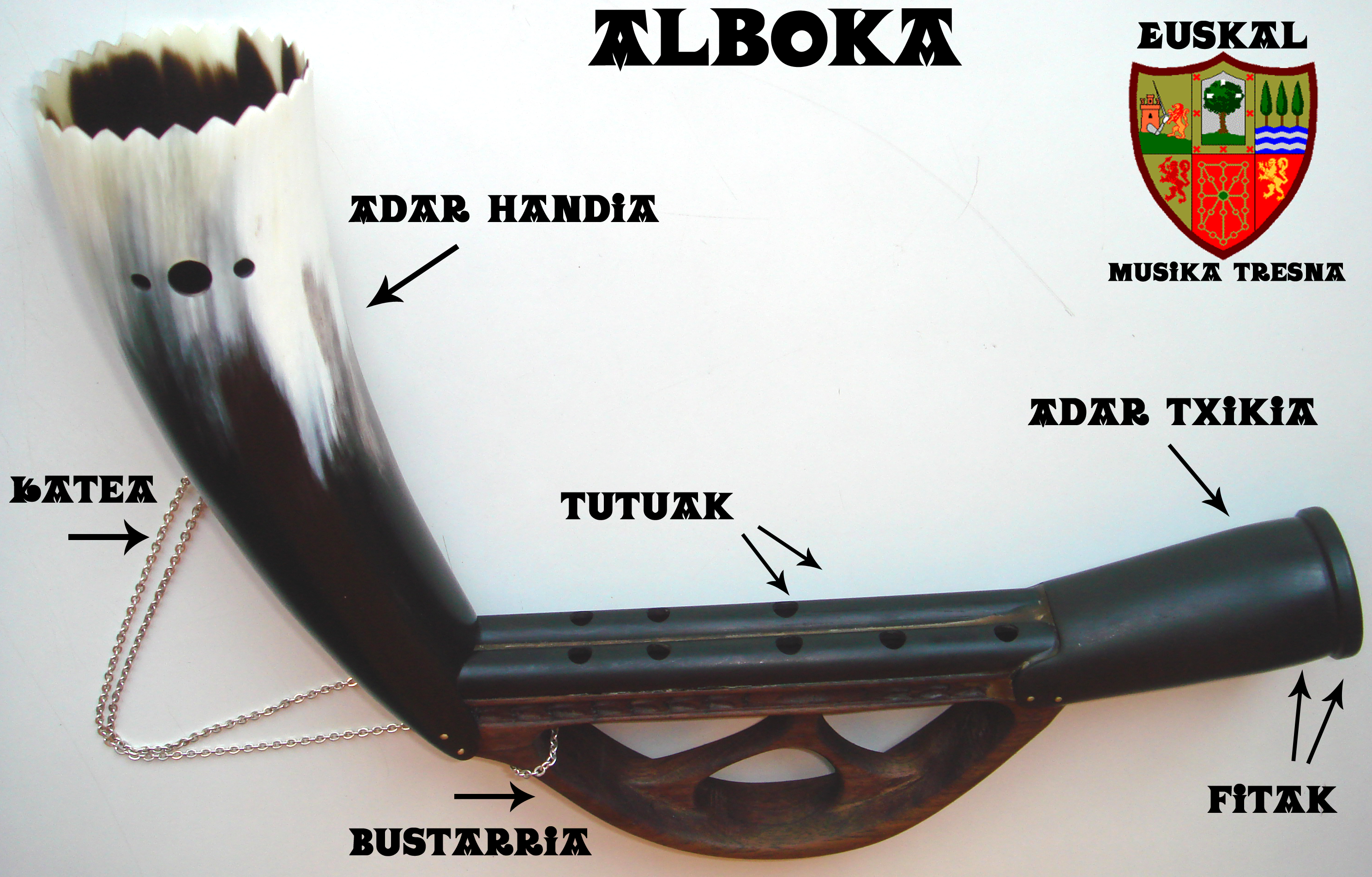 alboka, instrument de musique du pays Basque